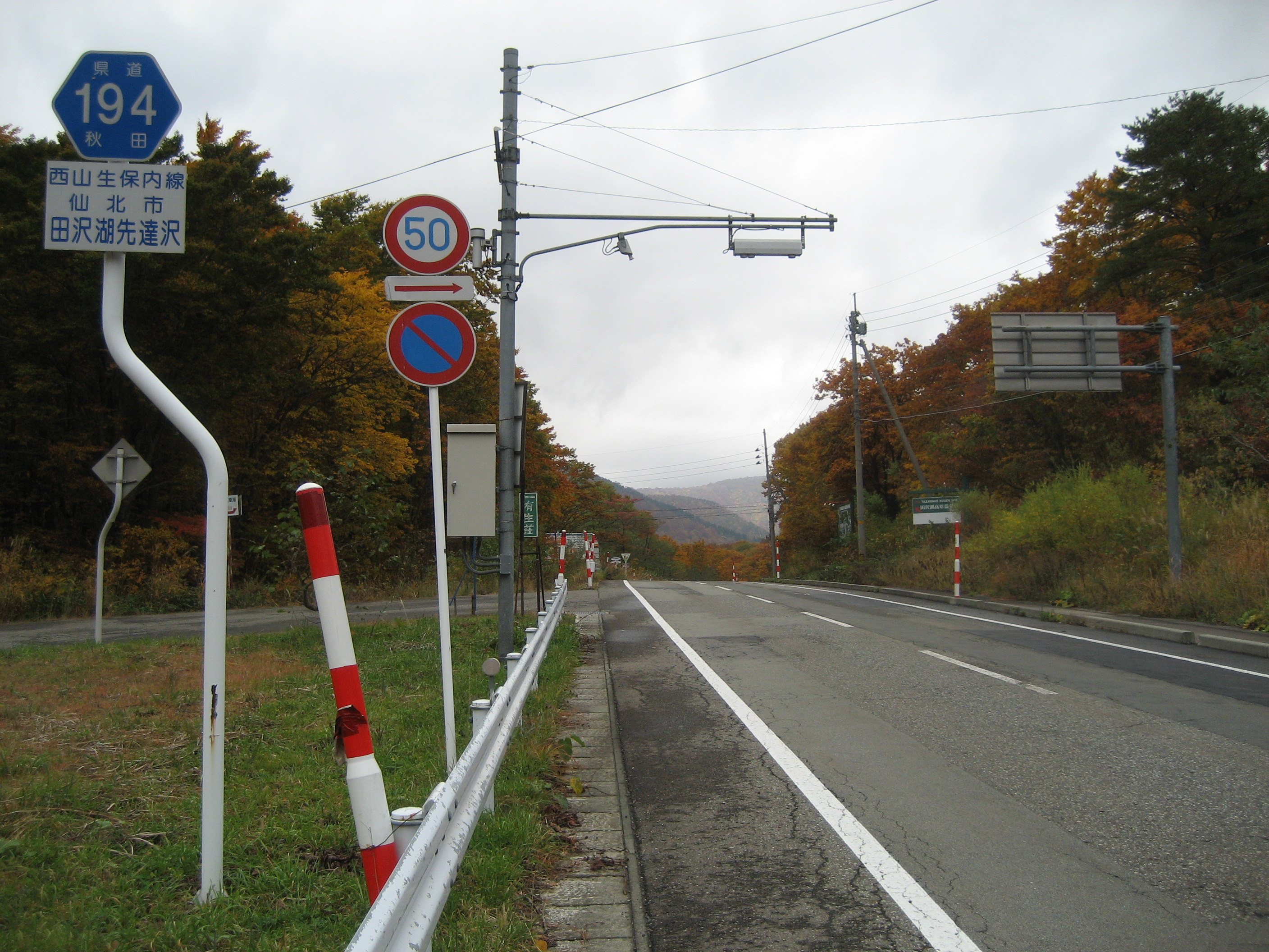 秋田県道60号線仙北市田沢湖先達沢付近